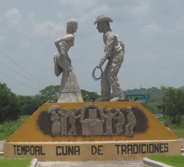 tempoal cuna de tradiciones